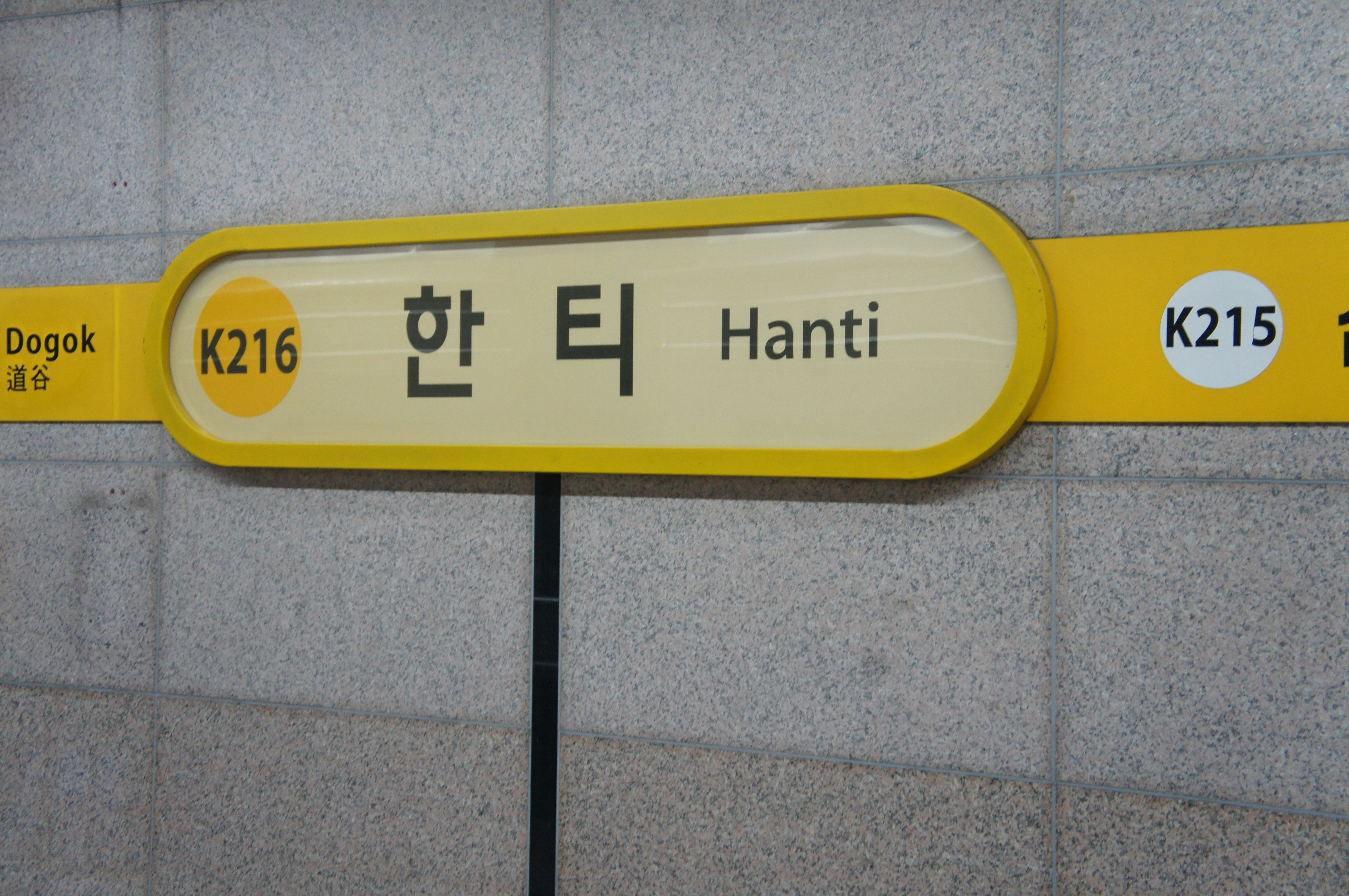 한티역 역명판